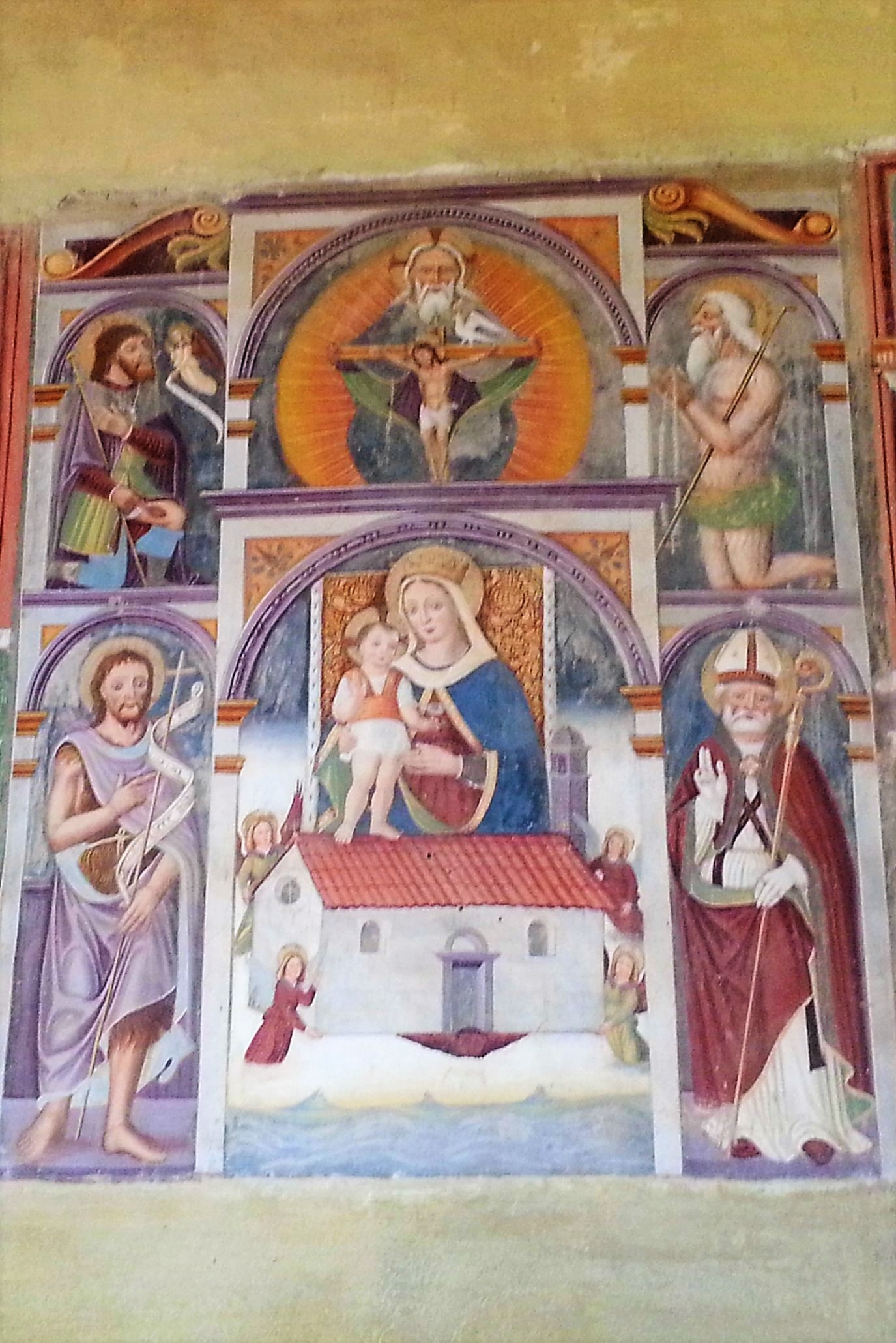 Affersci della Madonna col Bambino in trono atribuito alla scuola Maroniana